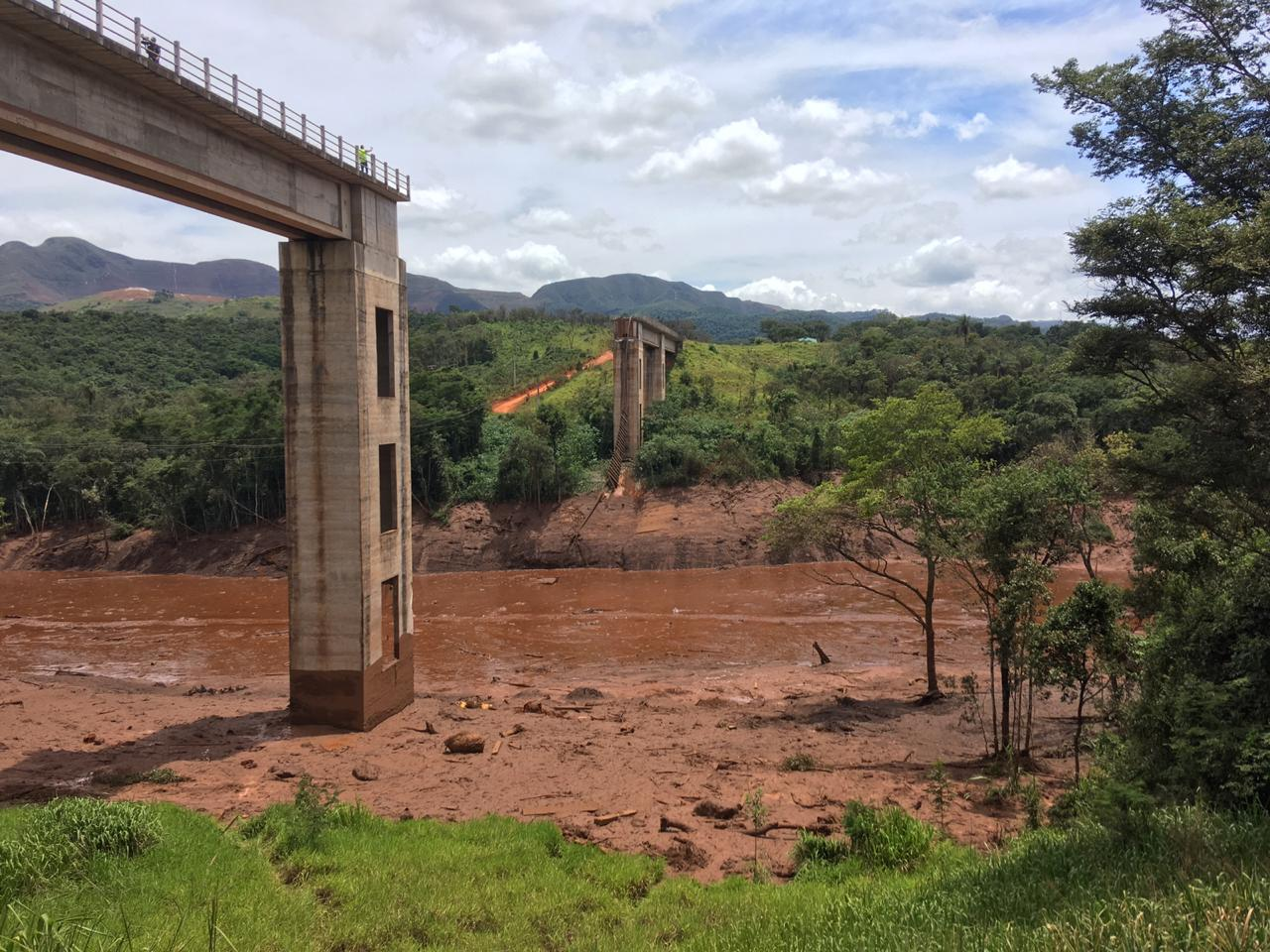 Fotografia das consequências da ruptura da barragem em Brumadinho, 2019.